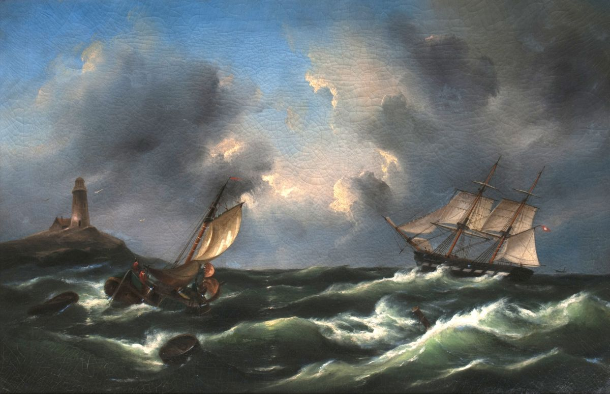 Hamburger Zweimaster vor einem Leuchtturm Öl/Lw., 60,5 x 96 cm, r. u. schwaches Signaturfragment, rest.